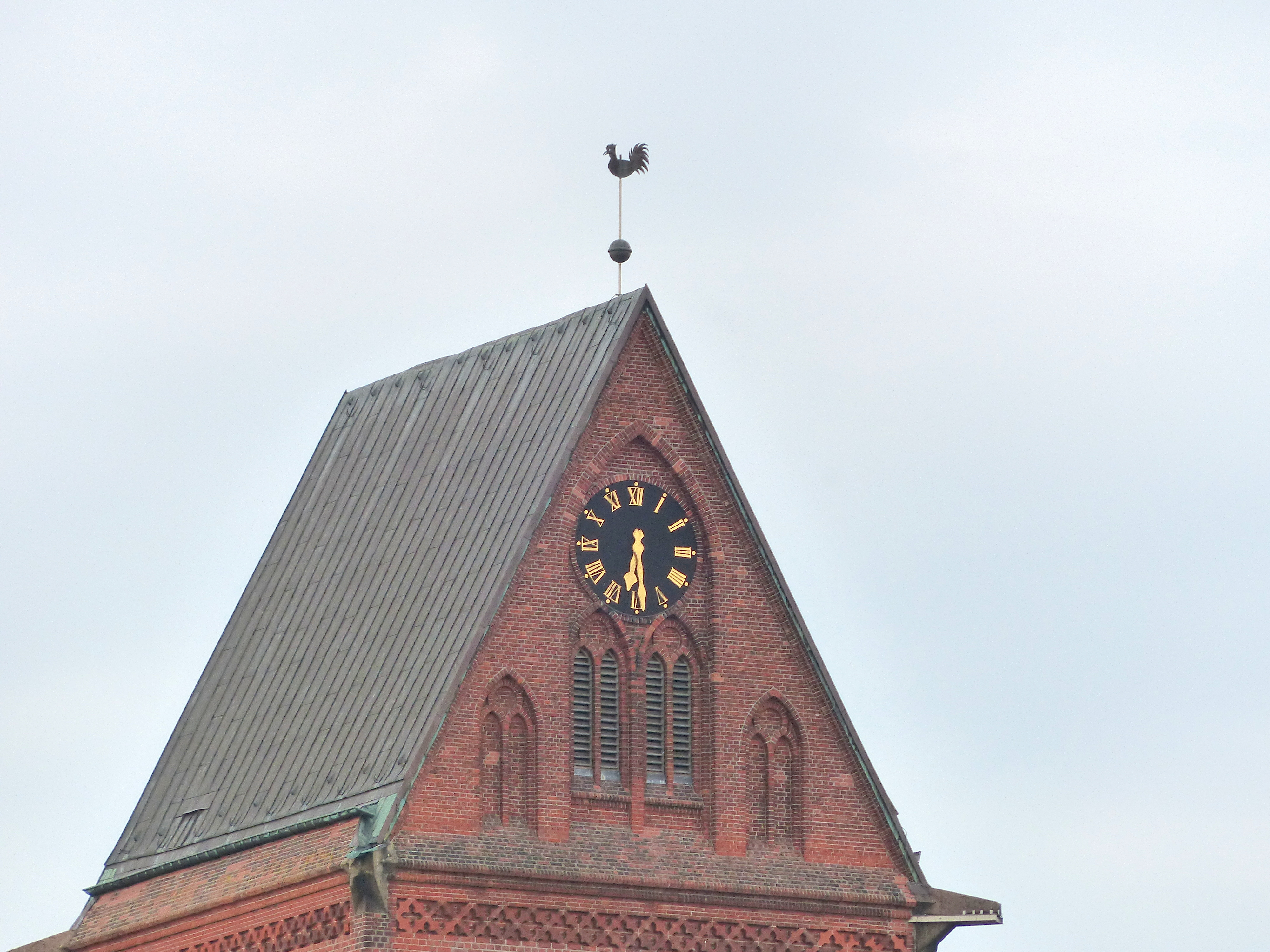 Anklam, Südansicht der Turmspitze der Marienkirche, aus Richtung Lilienthalgymnasium